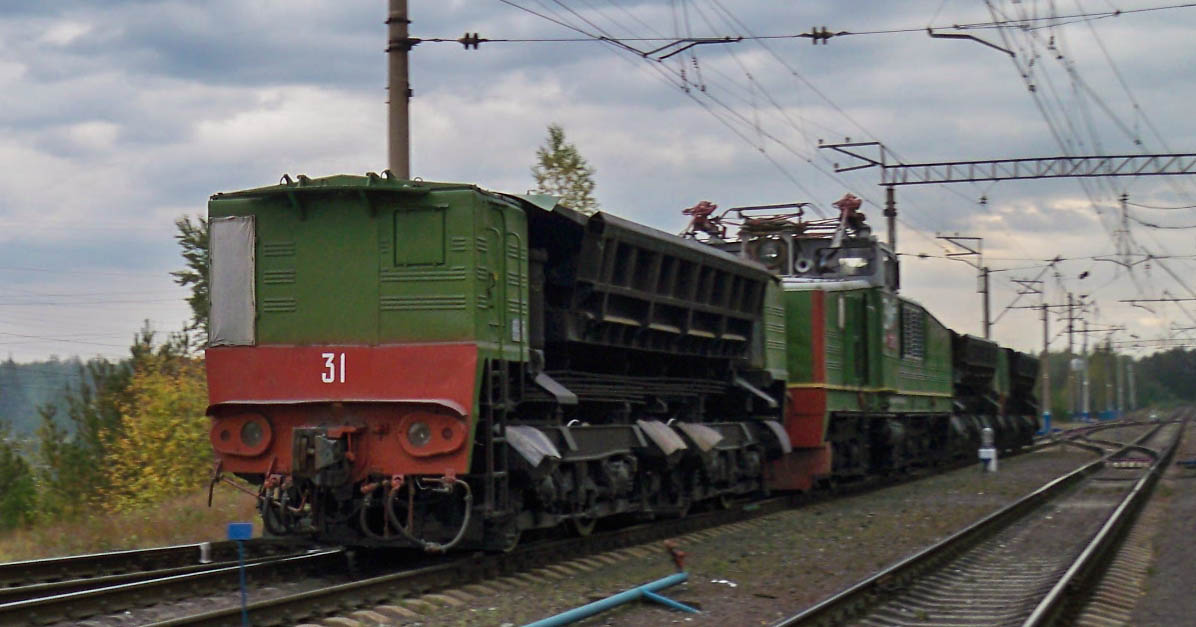 Тяговый агрегат ПЭ2М-113, моторный думпкар, станция Асбест.